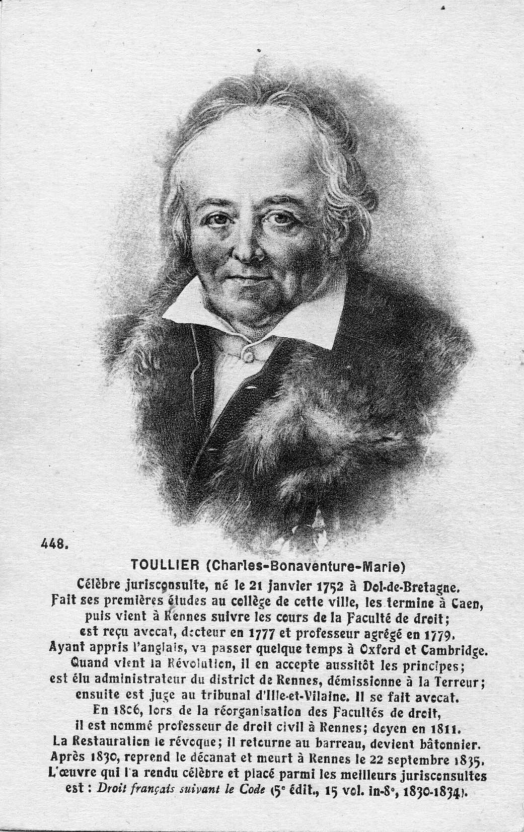 Portrait de Charles Toullier (1752-1835), jurisconsulte. Carte postale F. Château, conservée aux Archives de Rennes, 100 Fi 469